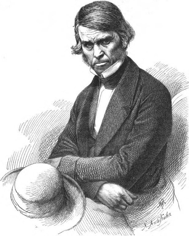 Thomas Carlyle, schottischer Schriftsteller und Essayist im 19. Jh.